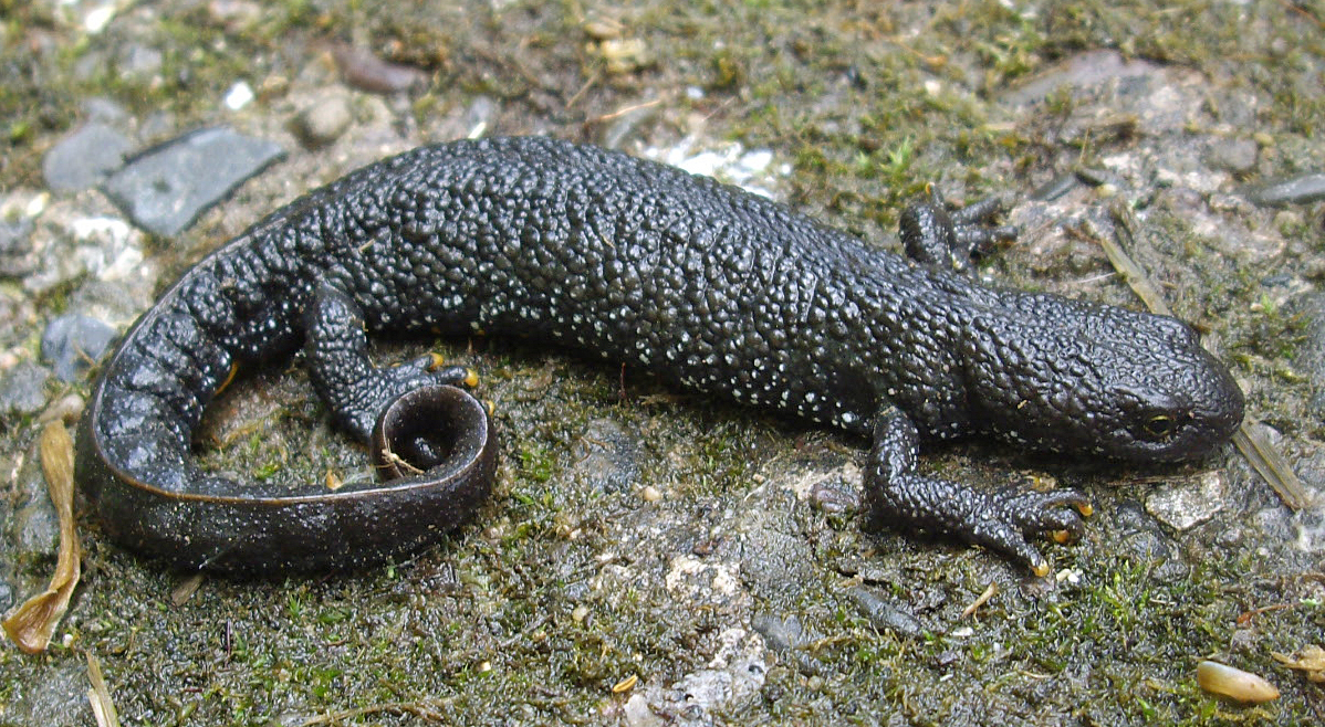 Nördlicher Kammmolch Triturus cristatus, am Rande des gefassten Tümpels hinter dem Zoologischen Institut, Göttingen.